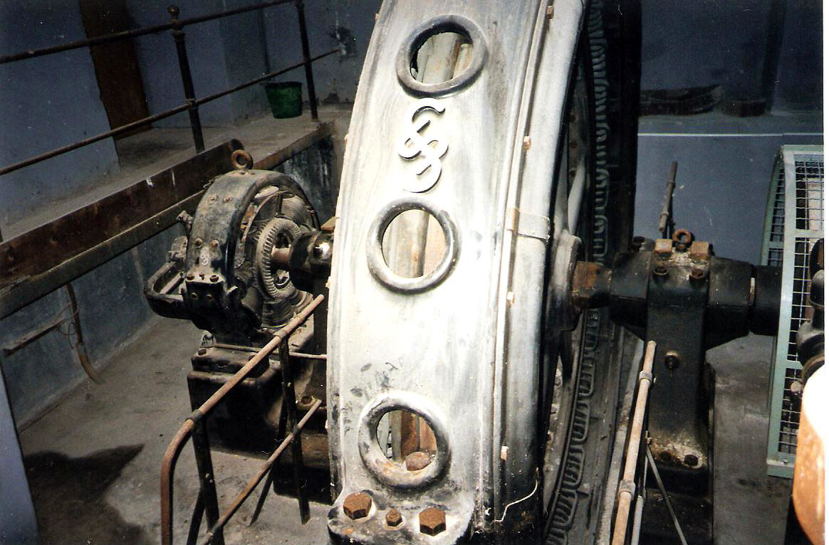 Erregermaschine und Drehstromgenerator von 1895 des Kraftwerks Stalleg. Von 1895 bis 1979 als zweites Drehstromkraftwerk ununterbrochen in Betrieb.